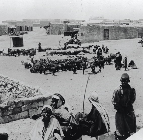 השוק בבאר-שבע